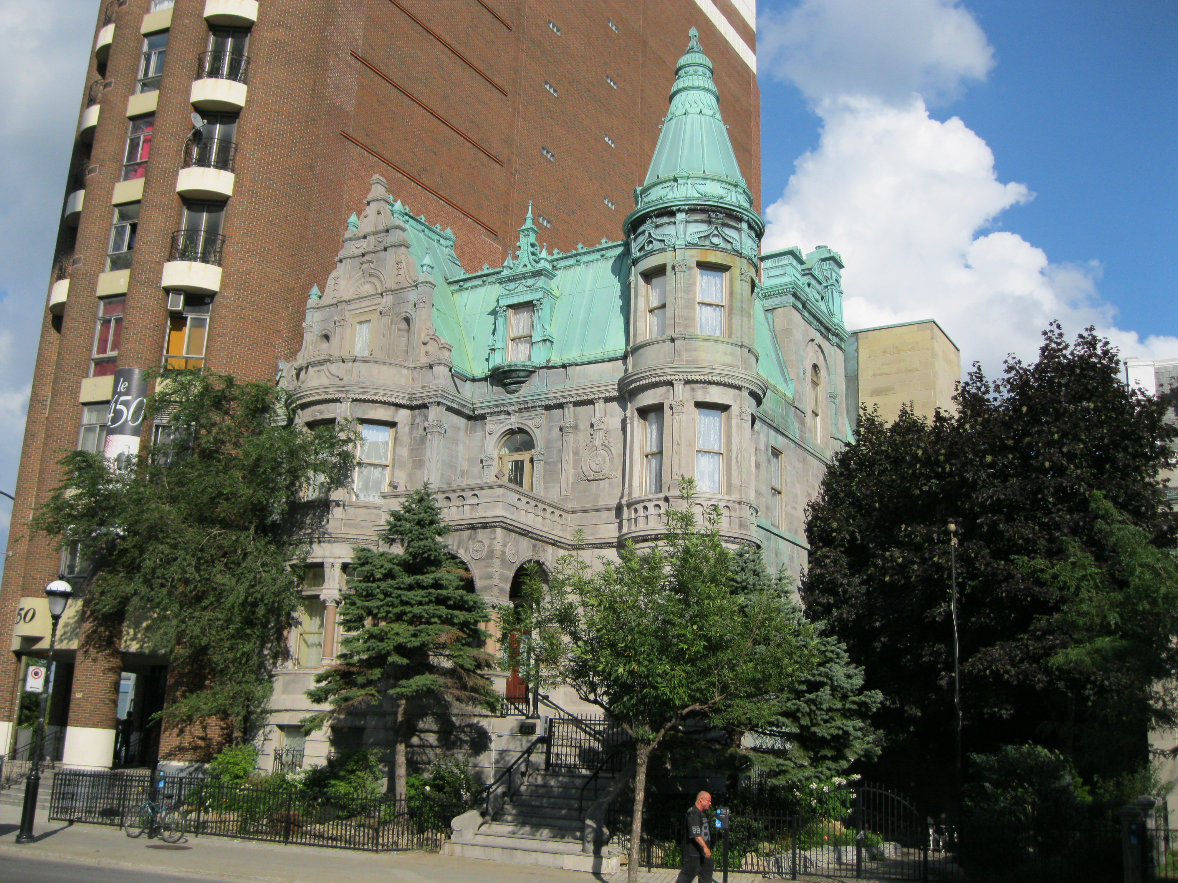 La maison Arthur-Dubuc, citée monument historique, est une résidence bourgeoise construite en 1894. Elle est située au 434, rue Sherbrooke Est, Montréal. À gauche: Le 450 Sherbrooke Est